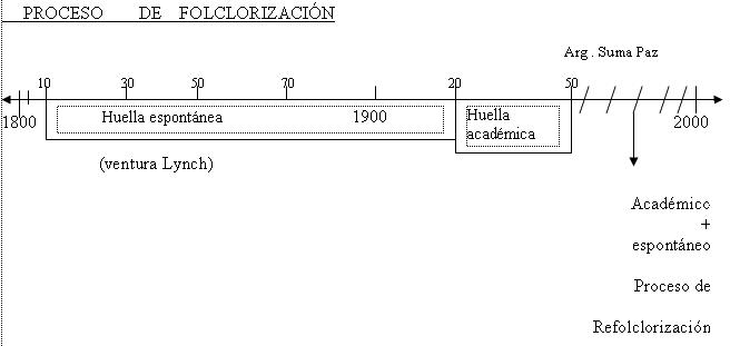 cuadro de refolclorizacion